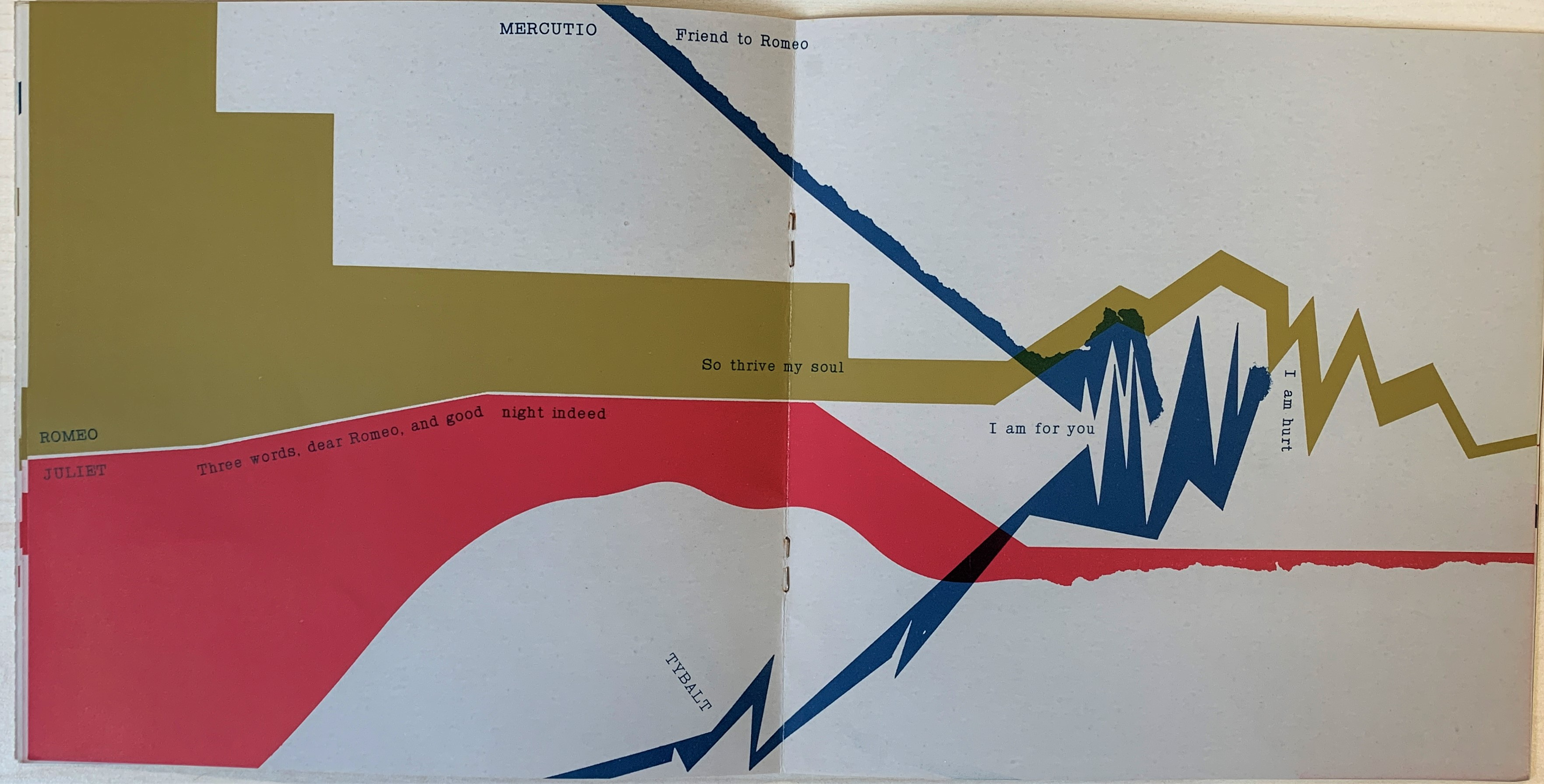 Pagina del libro Romeo and Juliet di Shigeo Fukuda